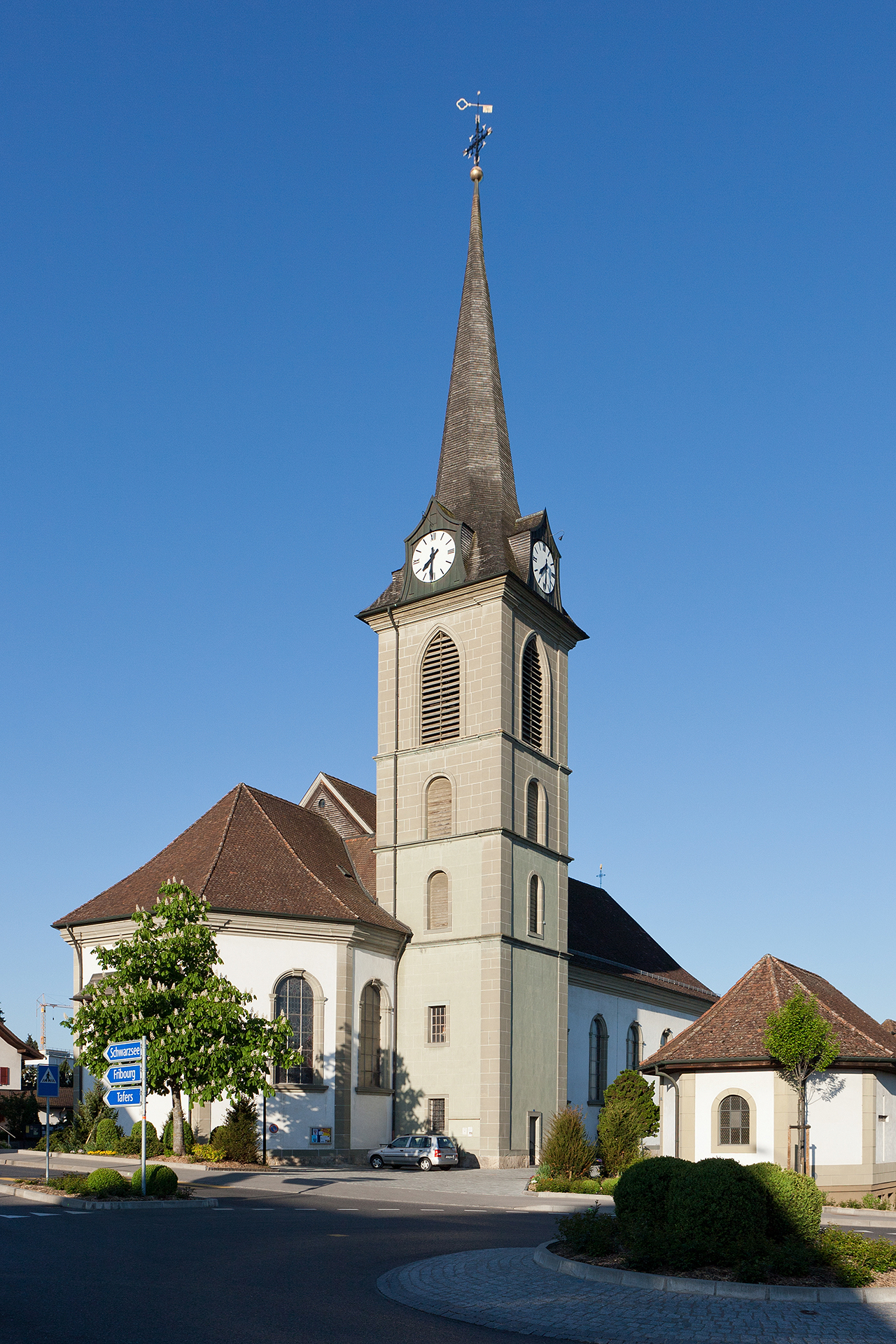 Pfarrkirche in Düdingen (FR)